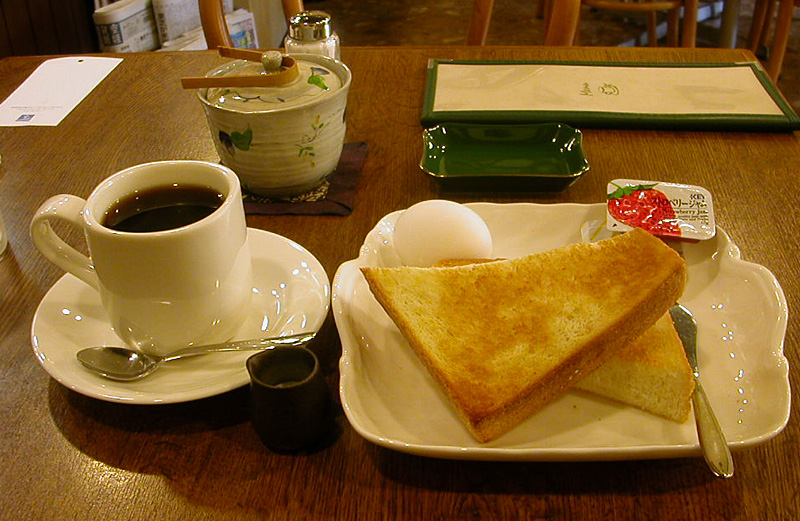 撮影者：小太刀 東京都千代田区神田2-6の喫茶店シャピロのモーニングセットです。朝10時まで。400円です。